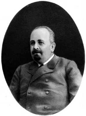 Иллюстрация для статьи о Михаиле Ивановиче Пыляеве